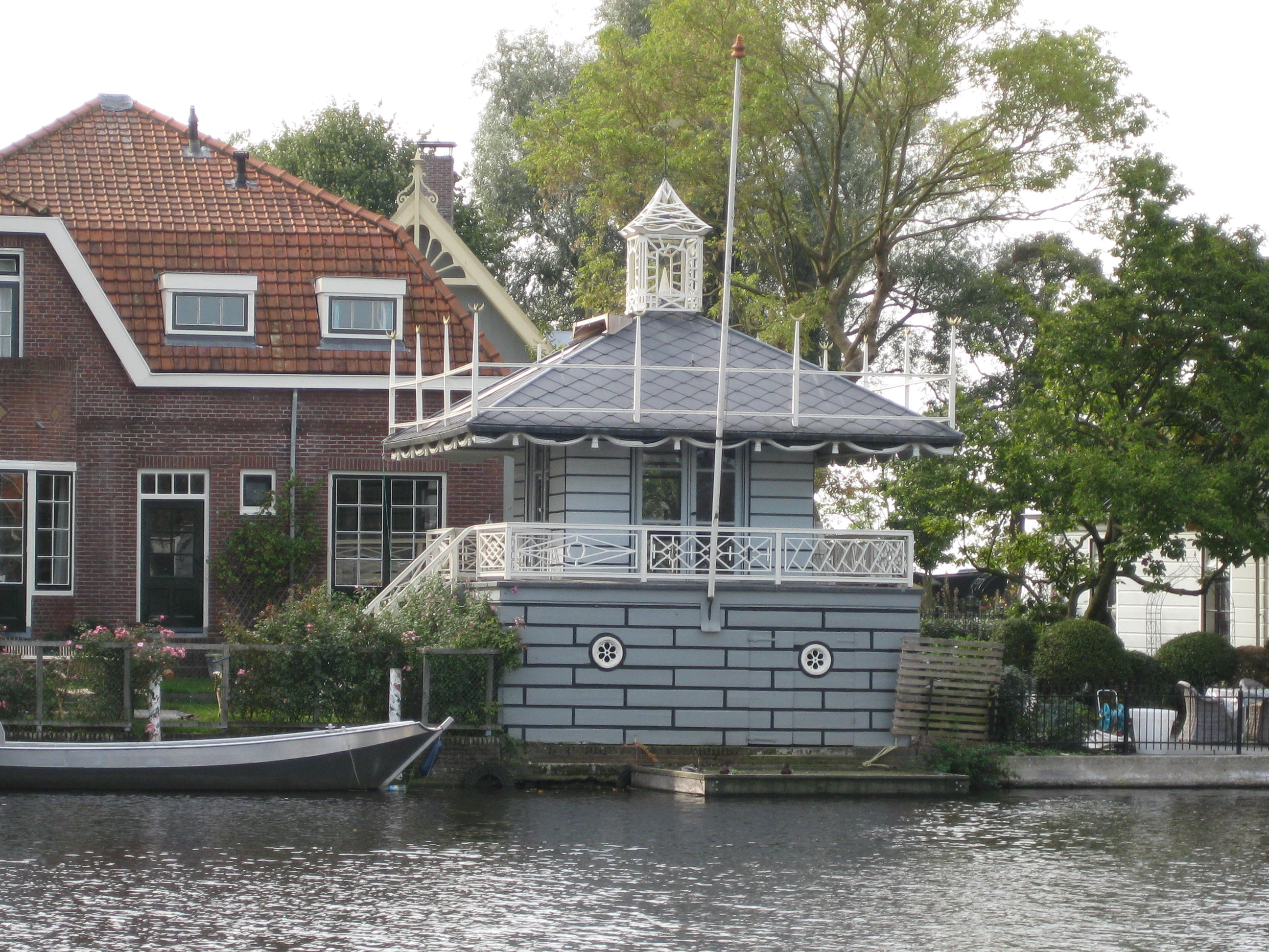 De Erven 3, Broek in Waterland. Houten paviljoen.